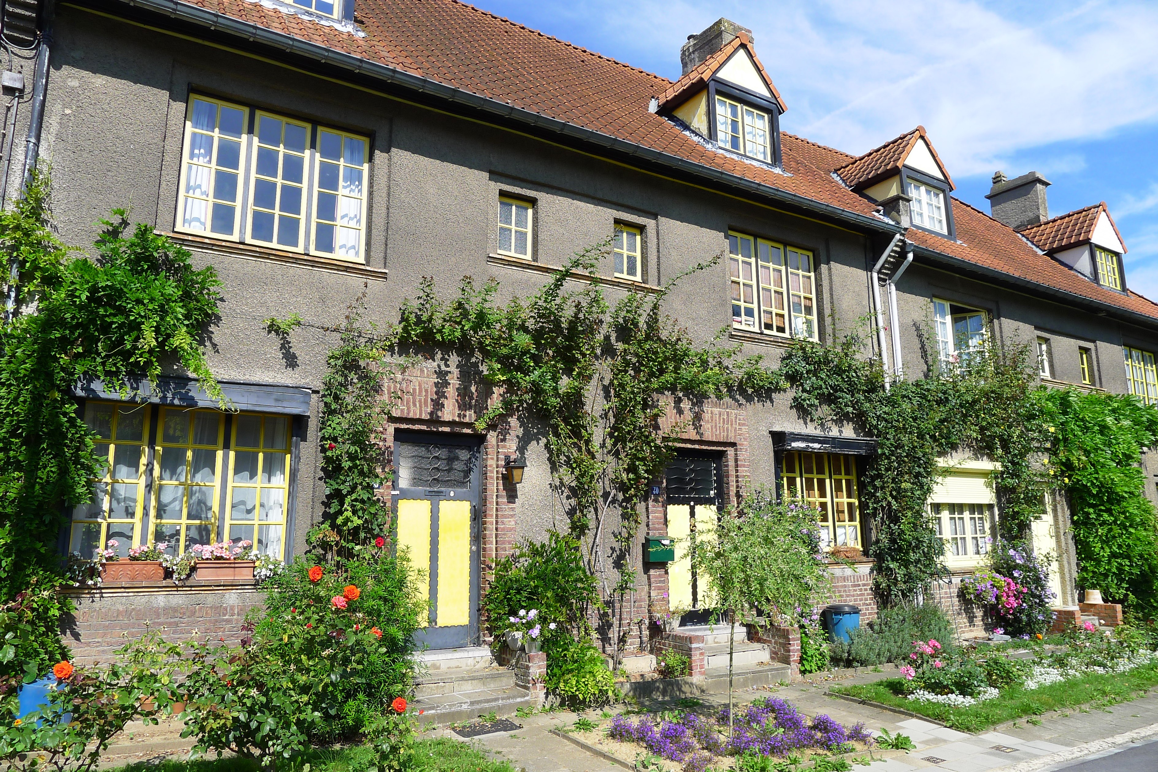 Cité-jardin Floréal